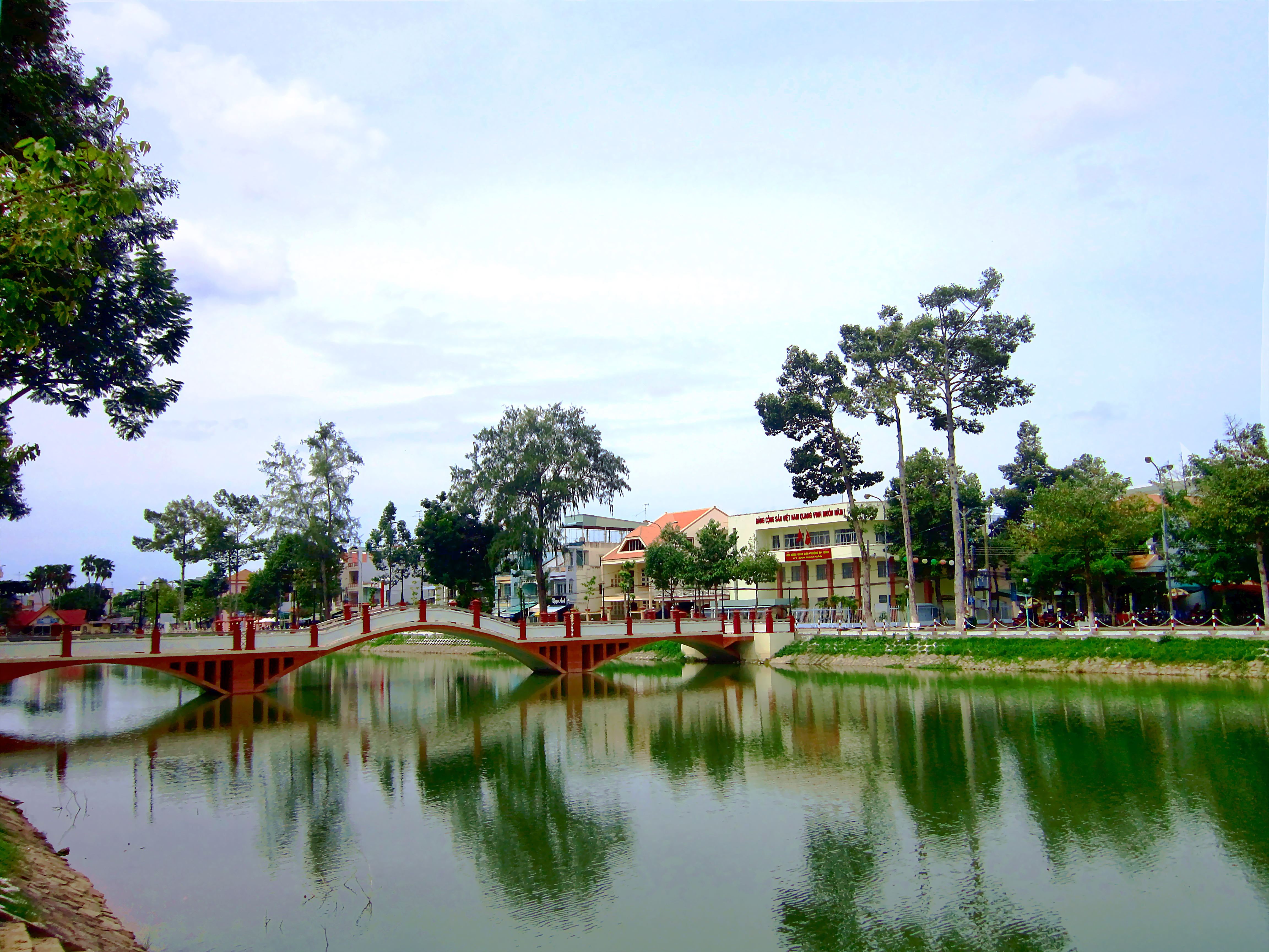 Hồ tại công viên Nguyễn Du, thuộc phường Mỹ Bình, thành phố Long Xuyên, tỉnh An Giang, Việt Nam.